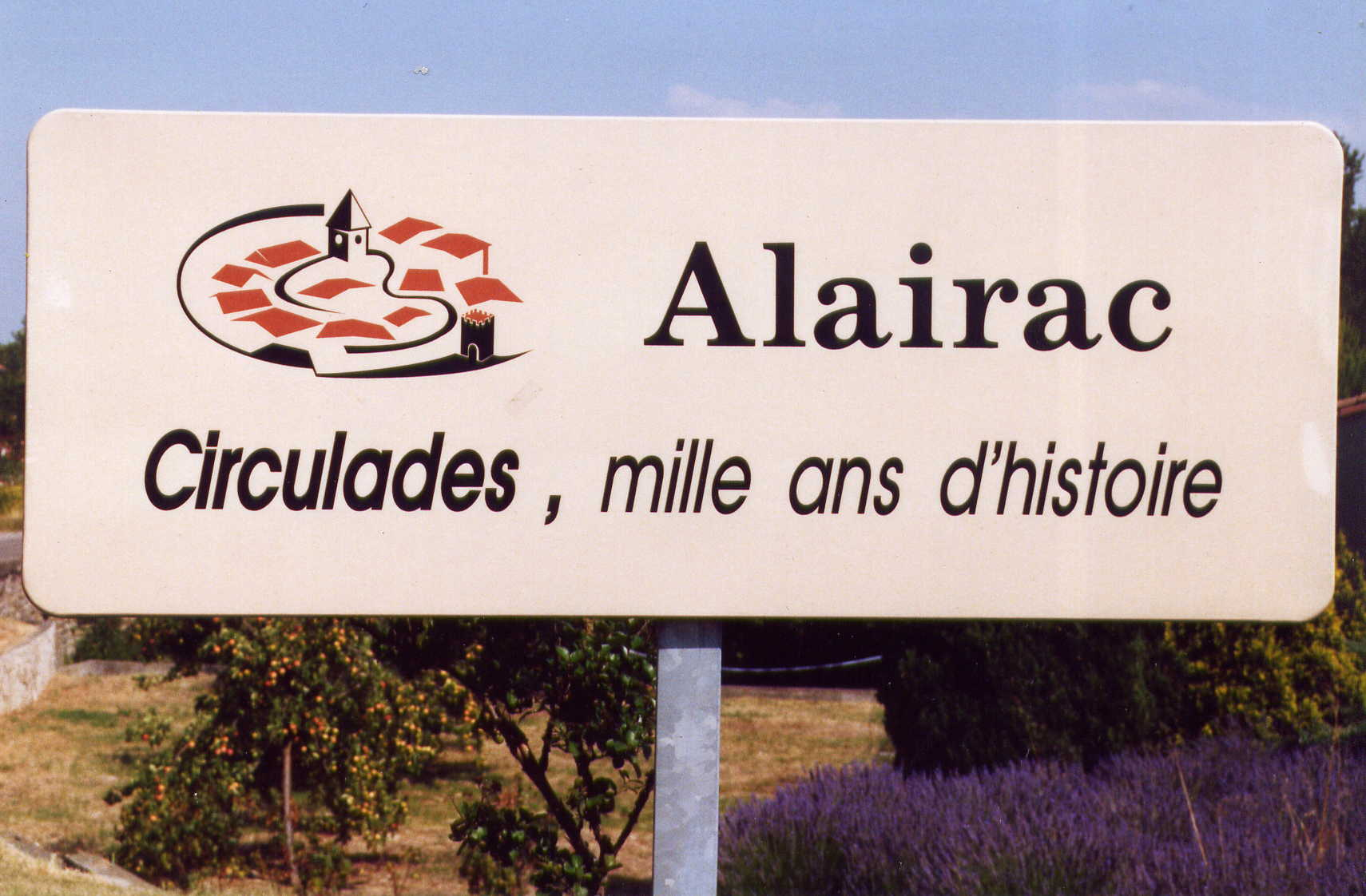 Panneau de la circulade d'Alairac(11290) à l'entrée du village